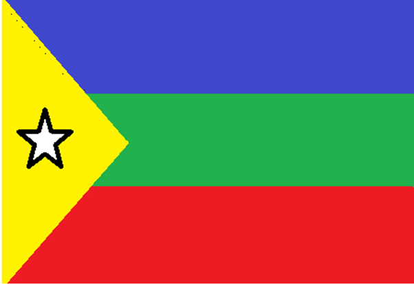 Bandera creada por el Ingeniero Jonathan Azuaje, propuesta para que sea la bandera oficial de la sub-región de los Valles del Tuy, estado Miranda